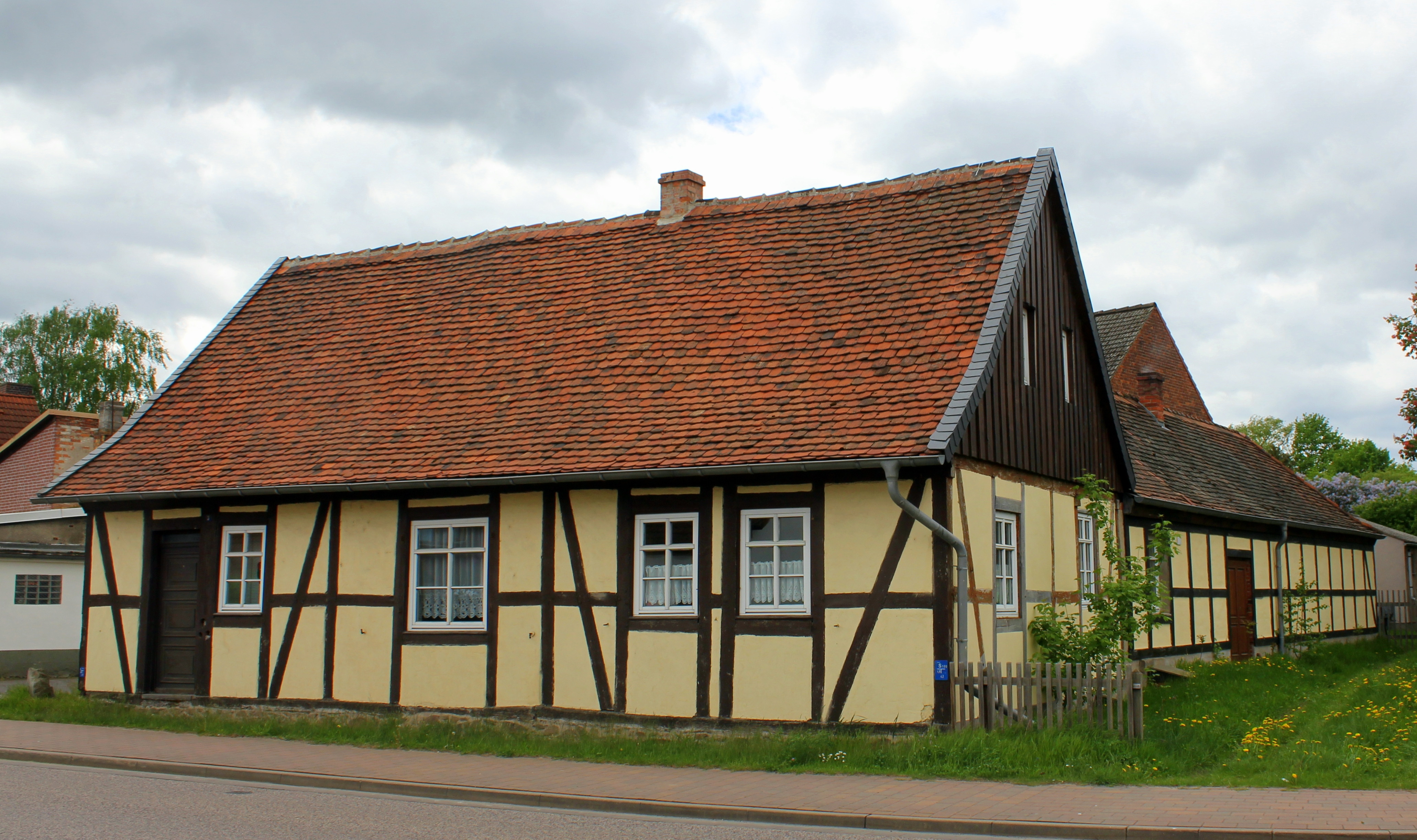 Wohnhaus, Magdeburger Straße 3, Zielitz